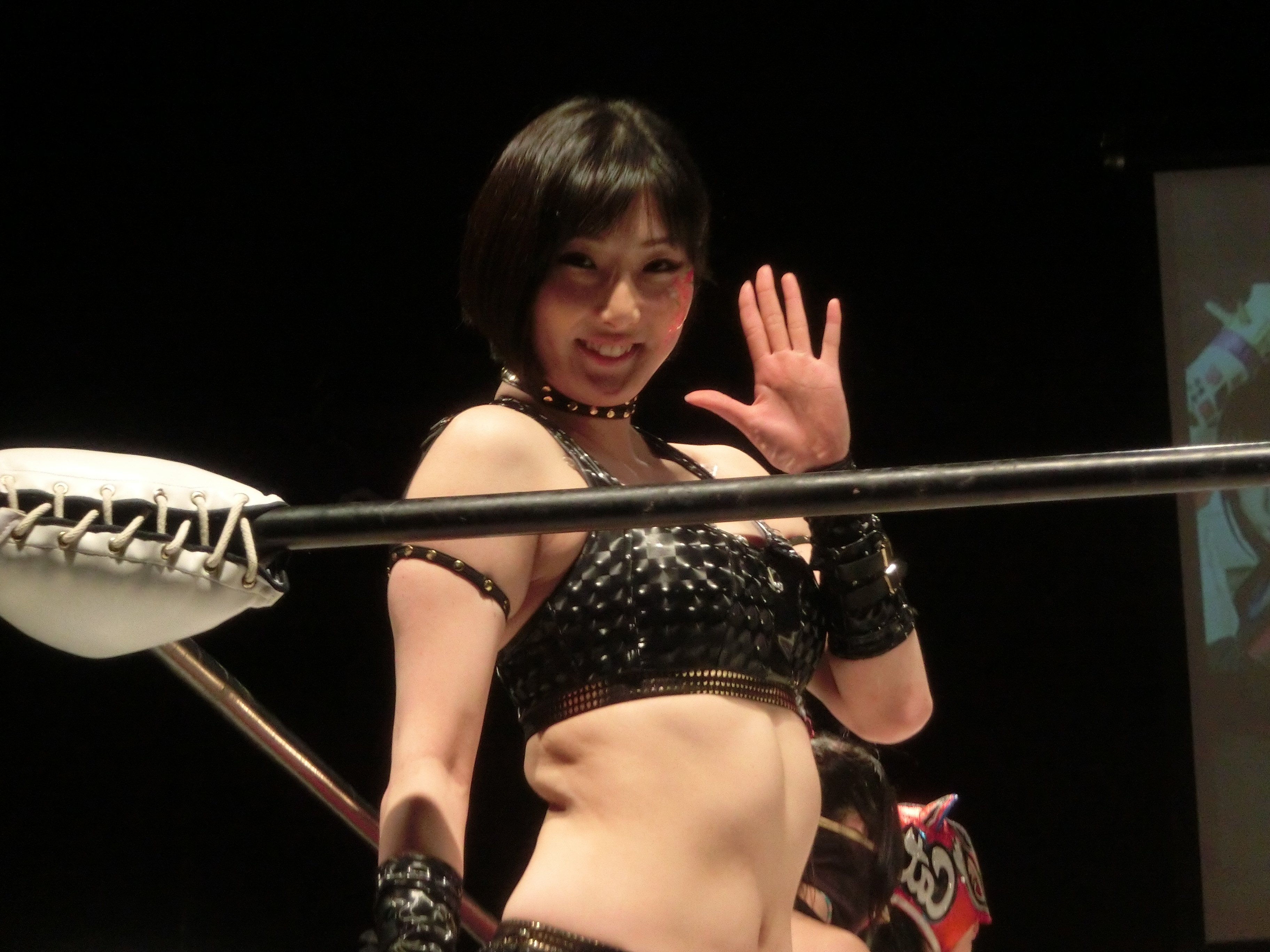 FUKUMEN-MANIA201802